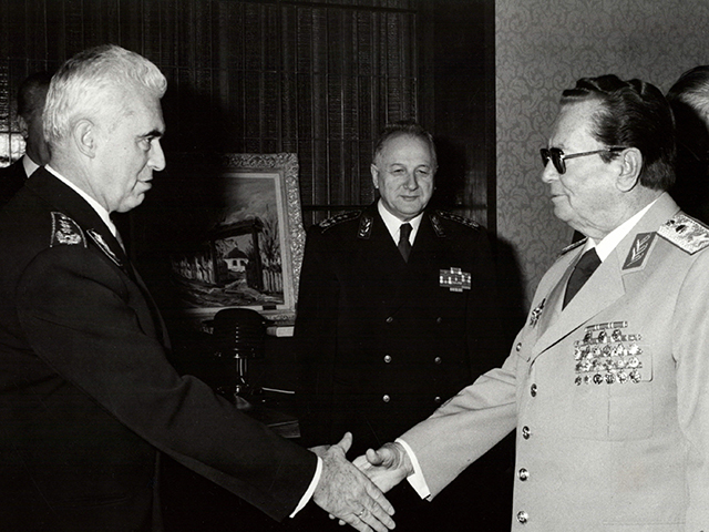 Srpski (latinica): Prijem delegacije JNA kod predsednika Tita, Brioni Inventarski broj:1978 689 092